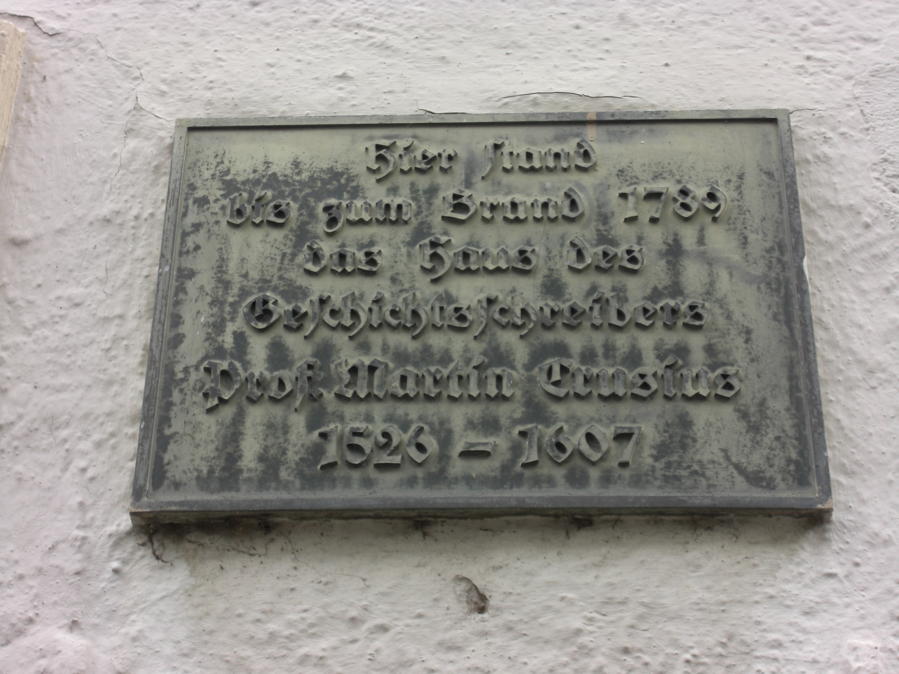 Gedenktafel für Martin Crusius (1526-1607), Altphilologe und Historiker; Tübingen, Pfleghof 4. Hier stand bis zum Brand 1789 das Haus des Geschichtsschreibers Prof. Martin Crusius 1526–1607